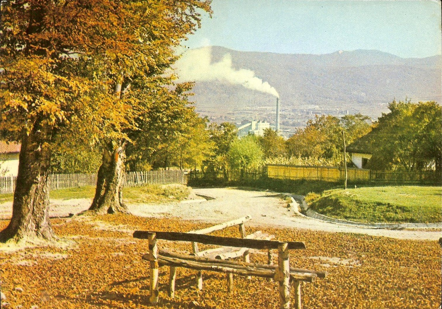 Peisaj industrial în zona Comănești, județul Bacău.